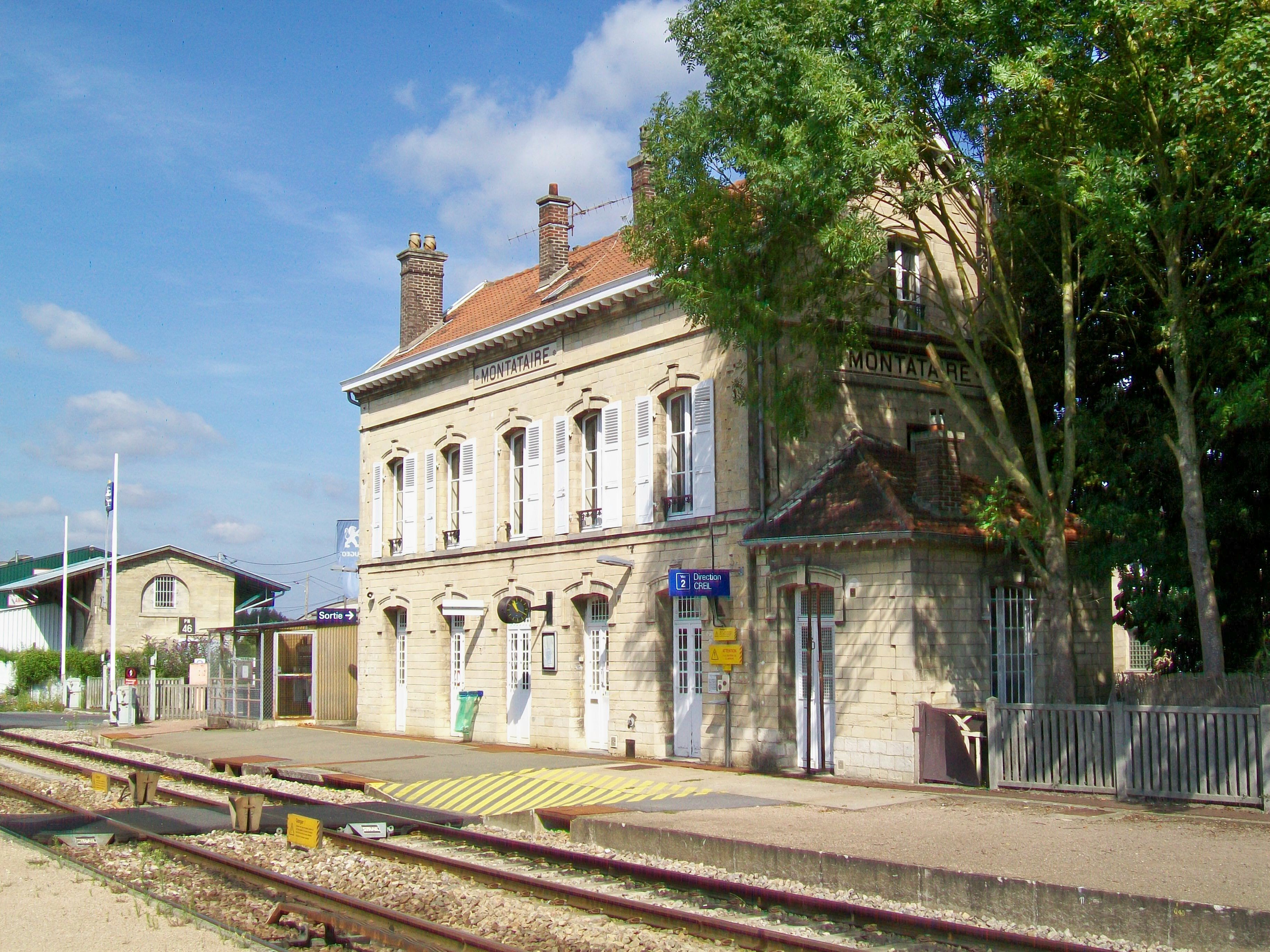 Bâtiment-voyageurs côté quais et ancienne halle à marchandises.